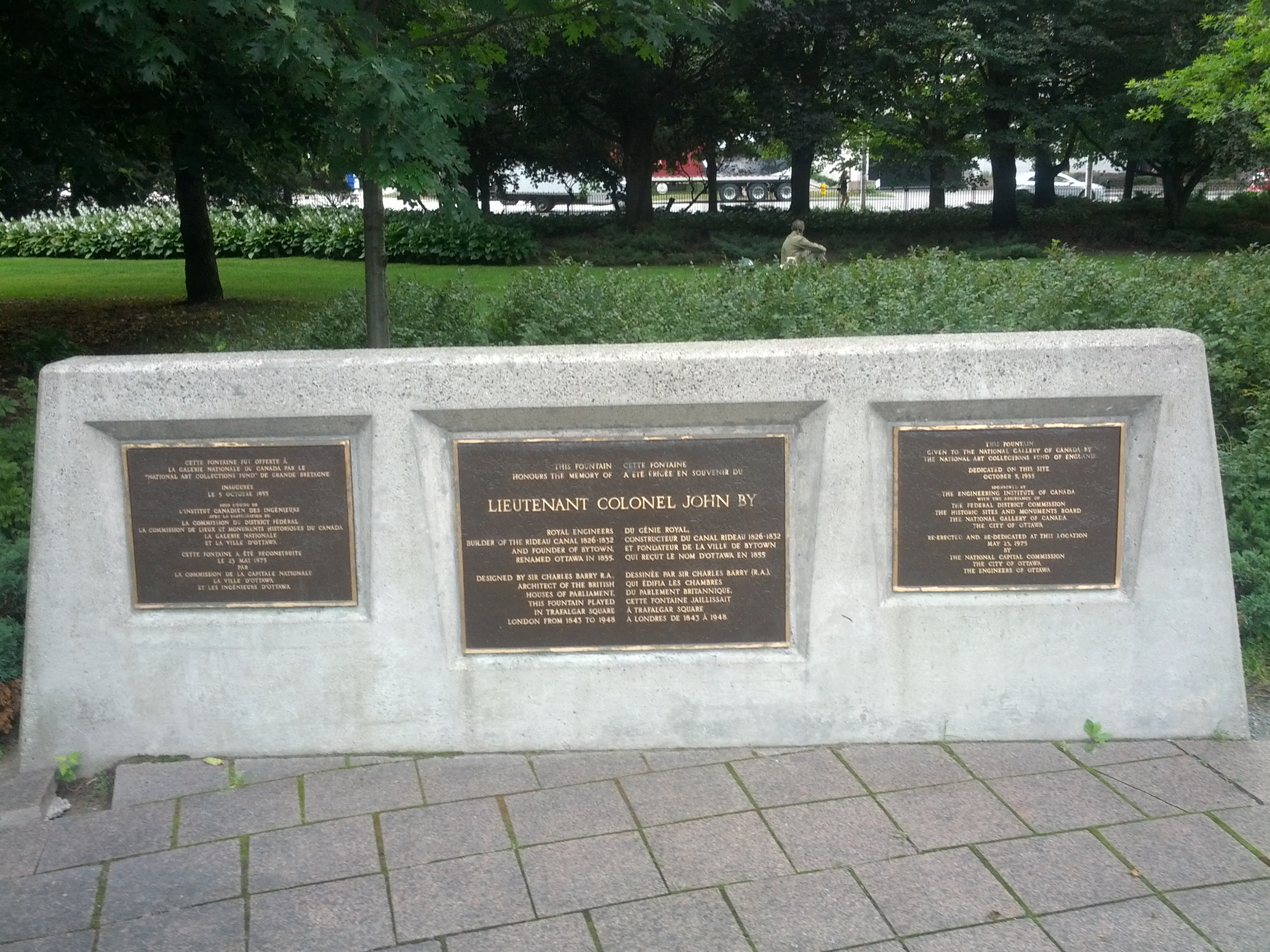 Placas em Ottawa